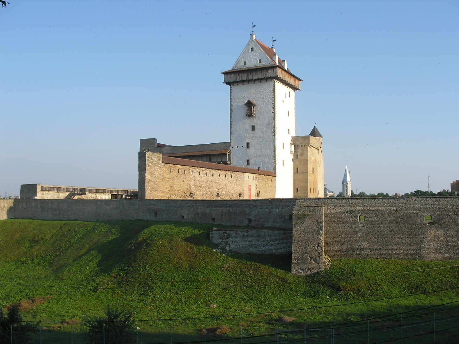 Narva Hermanni kindlus.